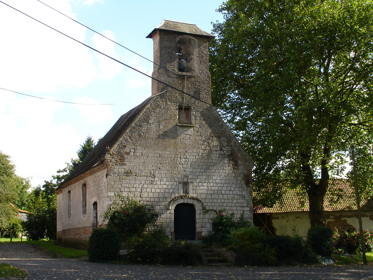 Église de Vacquerie-le-Boucq